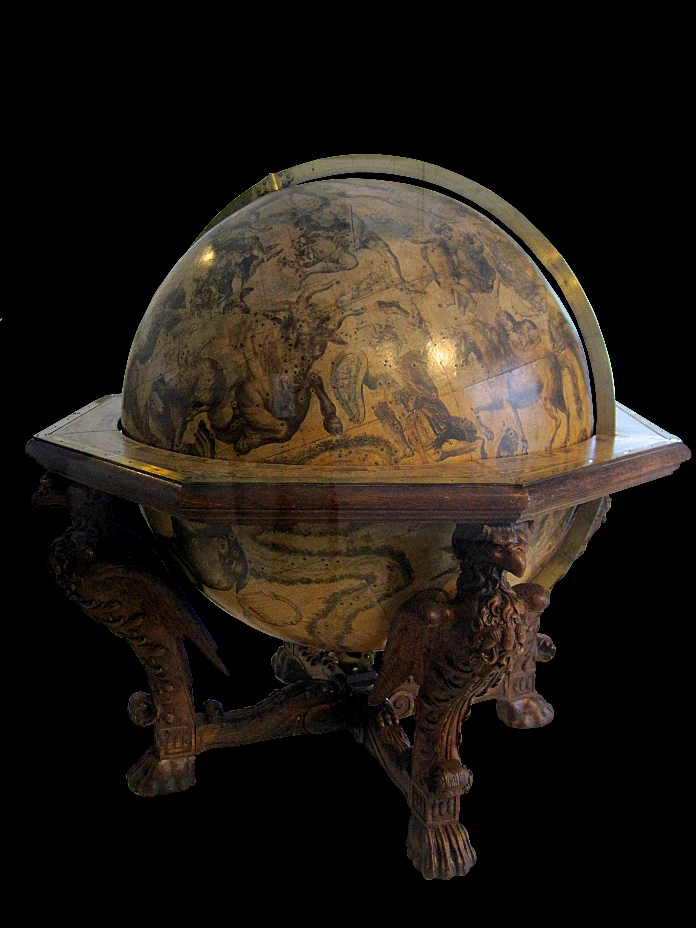 Globe céleste (H. 150 cm (globe et socle) ; diam. 150 cm), estampe sur armature de bois et toile plâtrée, réalisation d’Arnould de Vuez, d'après V. M. Coronelli et J. B. Corneille en 1693., conservé au palais des beaux-arts de Lille (INV XoA3) et photographiée lors de son exposition dans la Galerie du Temps (4 décembre 2012-3 décembre 2013) au Louvre-Lens (France).